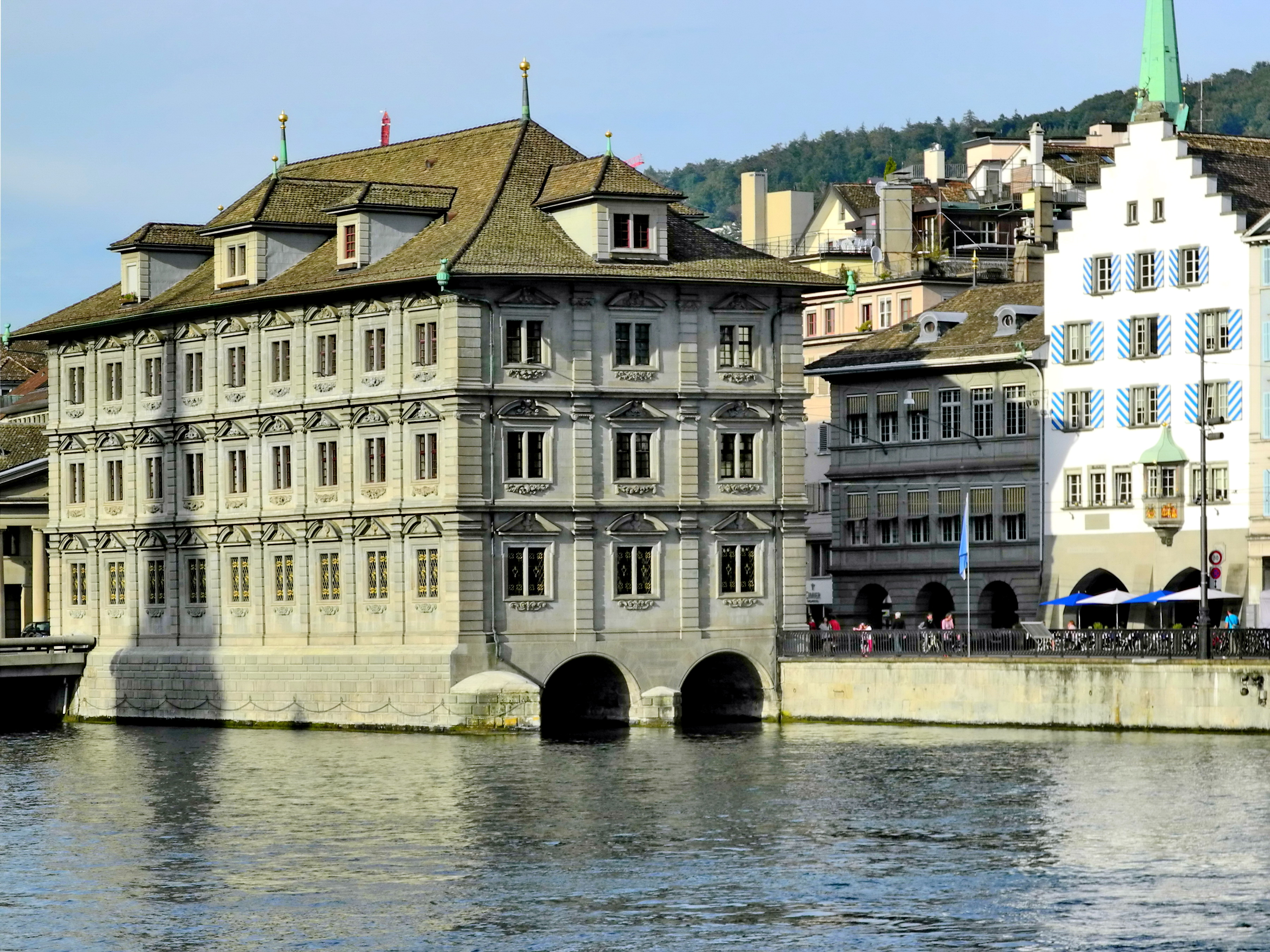 Rathaus Zürich